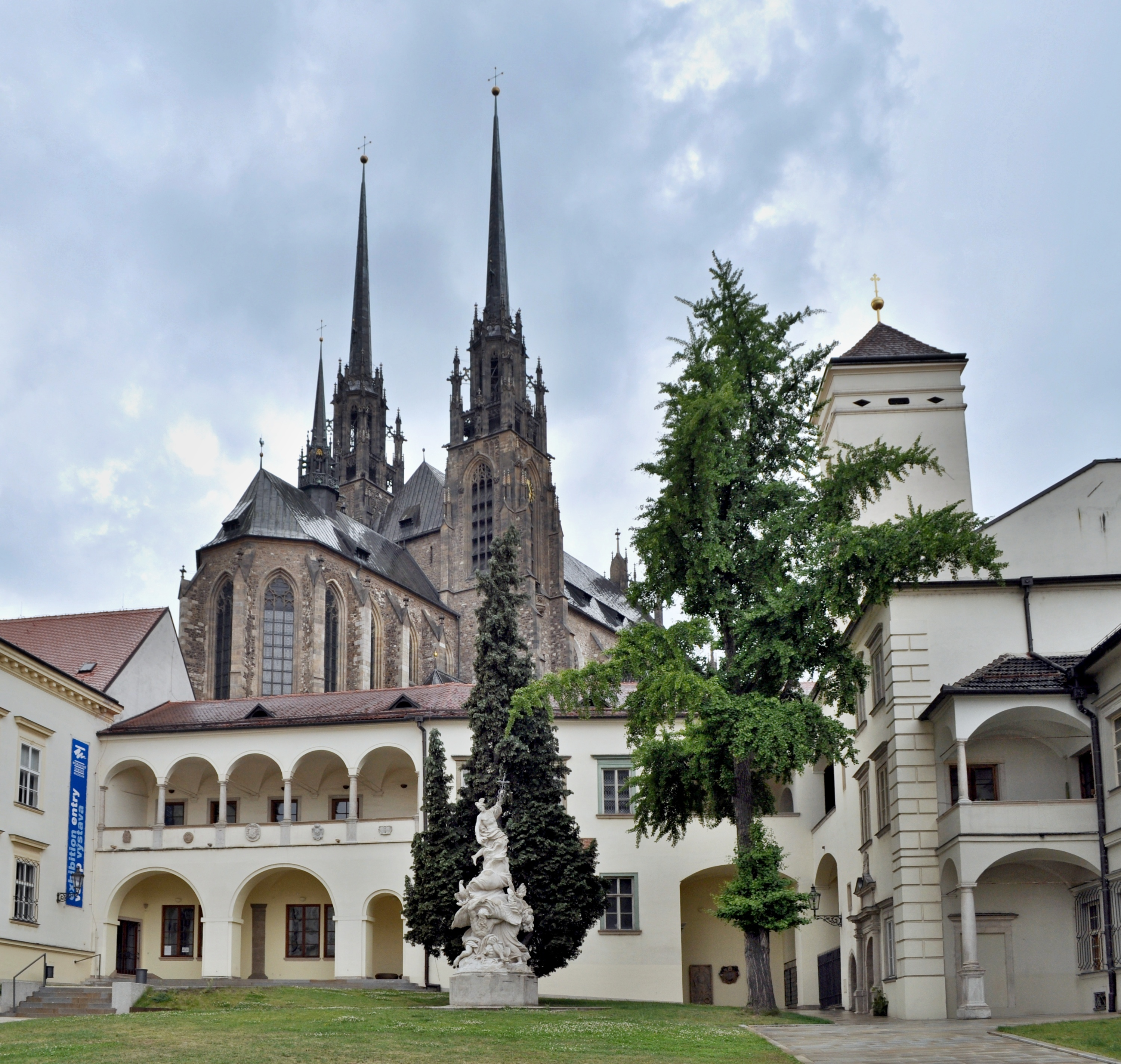 Biskupský dvůr (po dešti)